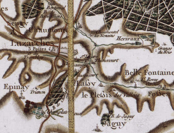 Luzarches (France) - Carte de Cassini, vers 1780.